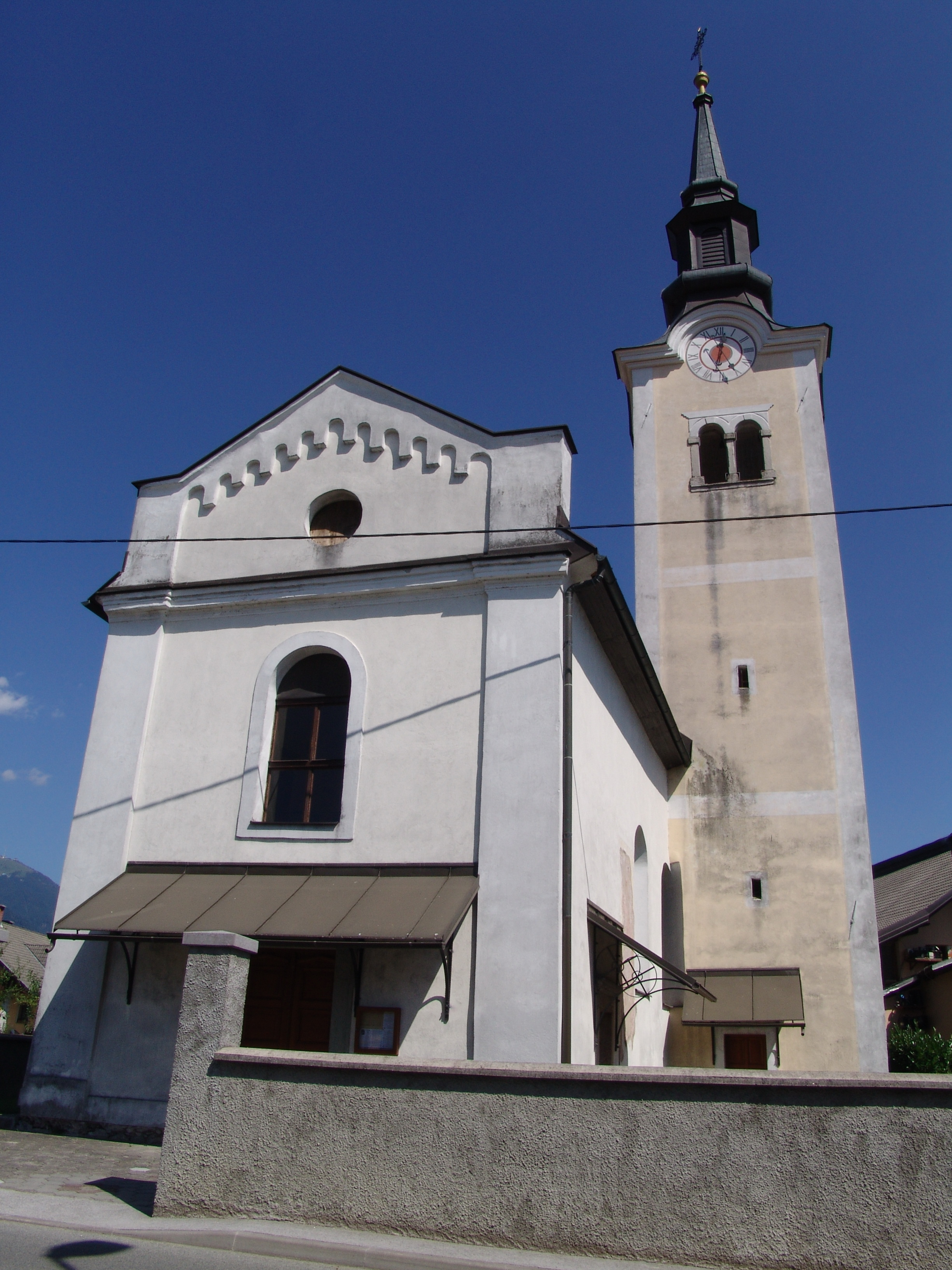 Vzhodno (glavno) pročelje ter zvonik cerkve sv. Urha v Hotemažah